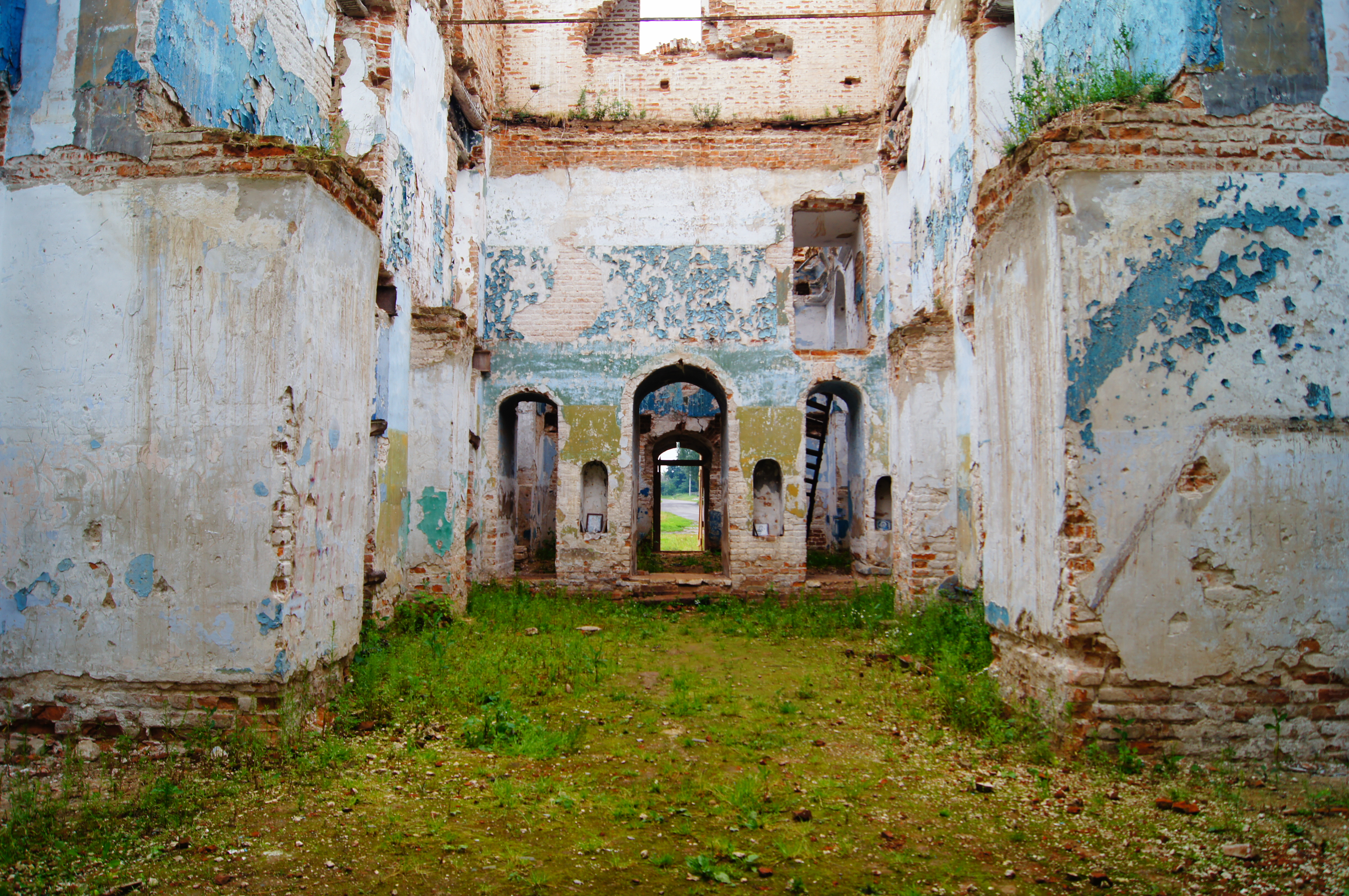 Интерьер Церкви Преображени в с.Хотылёво